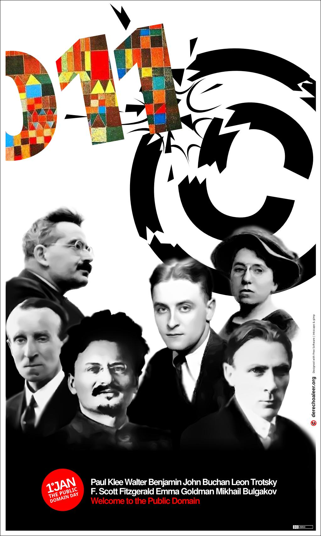 Póster del Día del Dominio Público 2011 publicado en el blog Derecho a Leer.